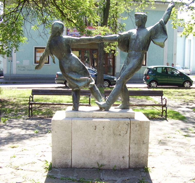 Olcsai Kiss Zoltán: Táncospár (1957) (bronzszobor). Kazincbarcika, Egressy Béni tér.